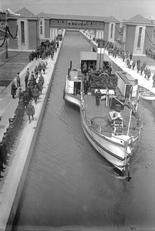 Die Einweihung der größten Binnenschleuse Europas in Anderten b./Hannover fand am 20. Juni durch den Reichspräsidenten von Hindenburg statt. Das erste Schiff mit dem Reichspräsident von Hindenburg an Bord , wird durch die neue festlich geschmückte 300 m lange Hindenburg-Schleuse geschleust.